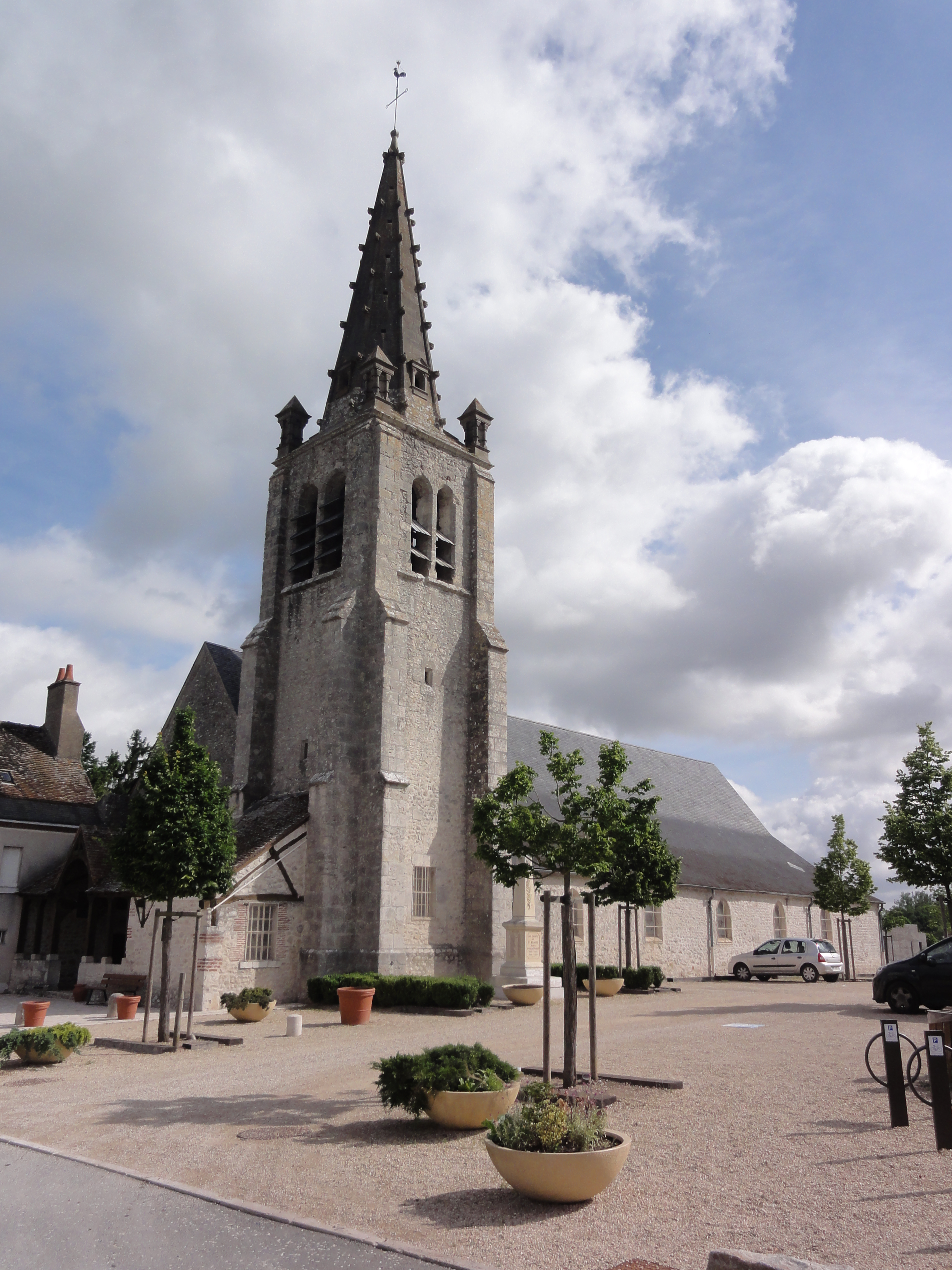 Église Saint-Hilaire de Saint-Hilaire-Saint-Mesmin (Loiret) .